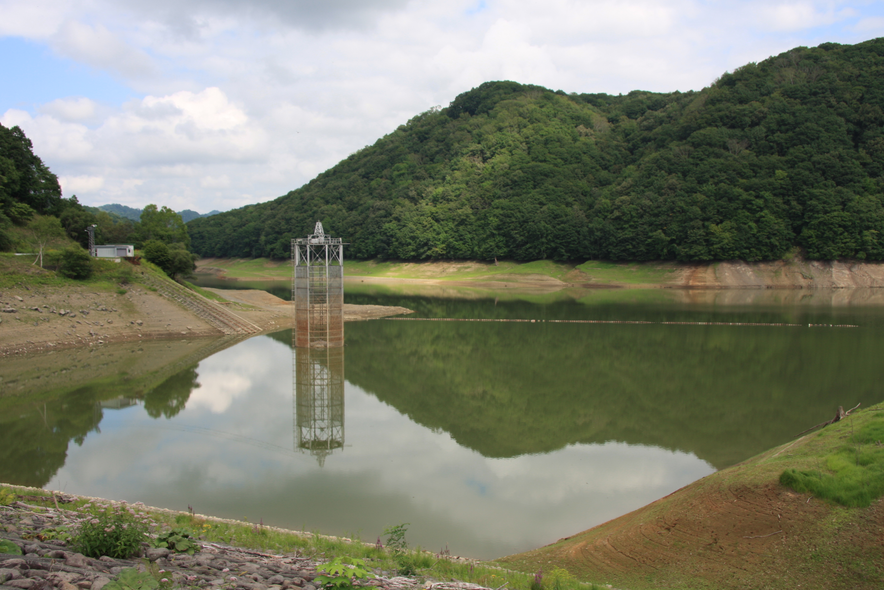 厚真ダム調整池